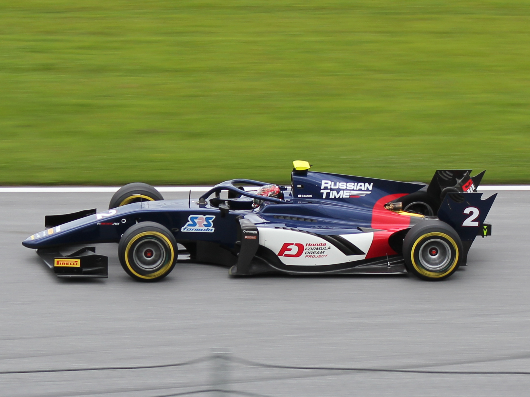 02 Tadasuke Makino beim Rennwochenende in Österreich 2018 (3)